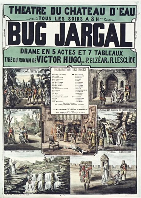 Théâtre du Chateau d'eau... Bug Jargal, drame en 5 actes et 7 tableaux tiré du roman de Victor Hugo par P.Elzear & R. Lesclide : affiche